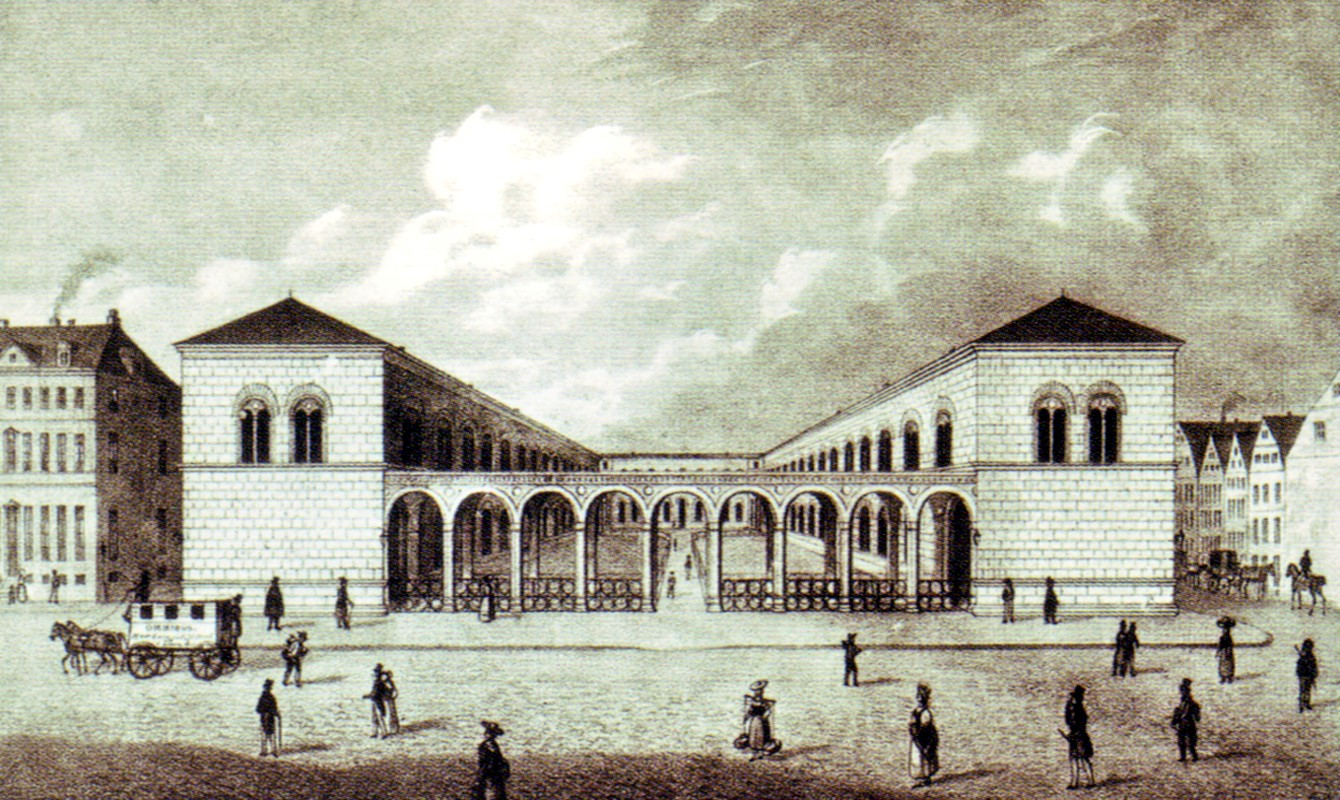 Gelehrtenschule Johanneum in Hamburg, Lithografie um 1840